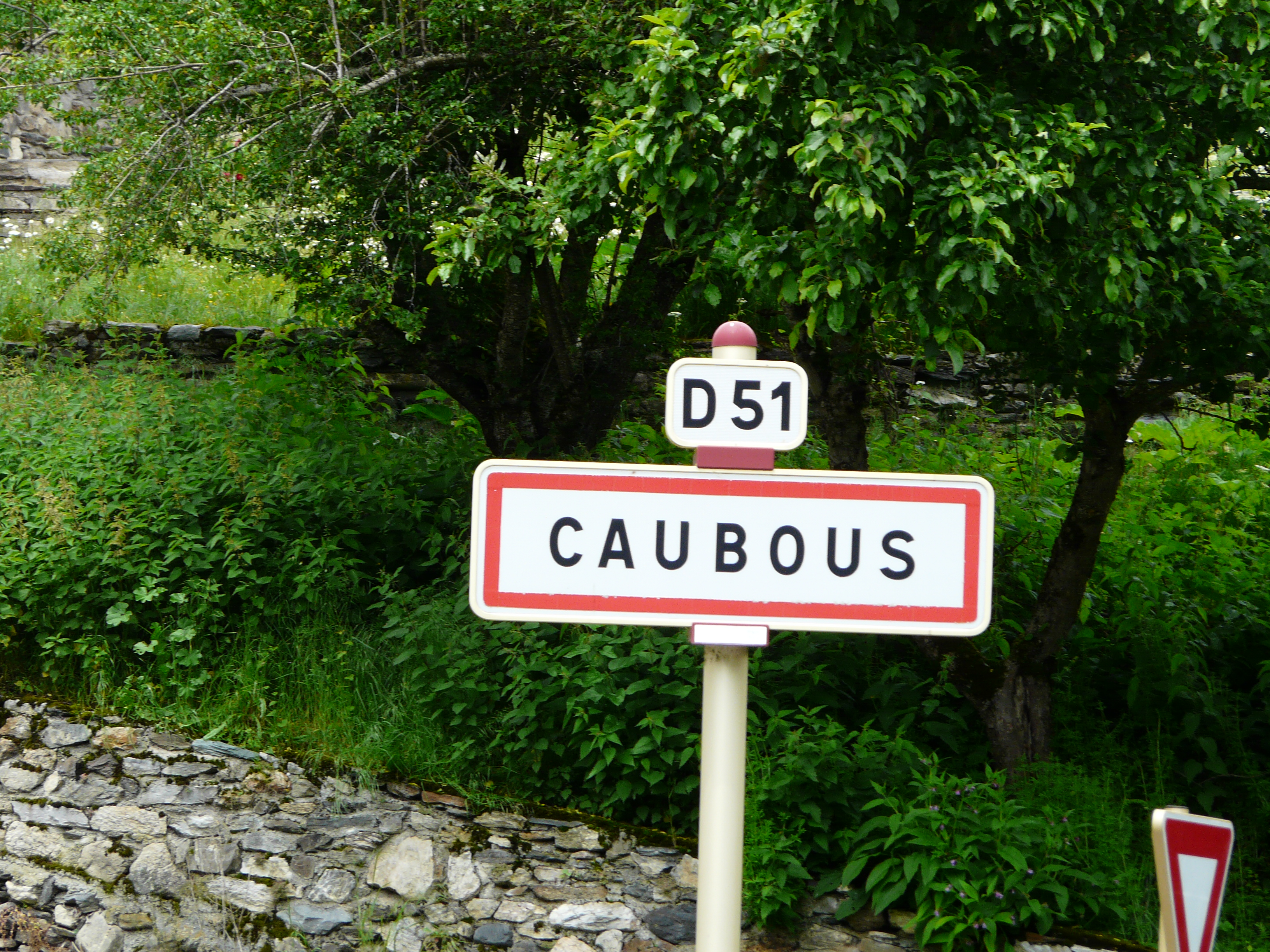 Panneau sur la route départementale 51 signalant l'entrée dans le village de Caubous, Haute-Garonne, France.